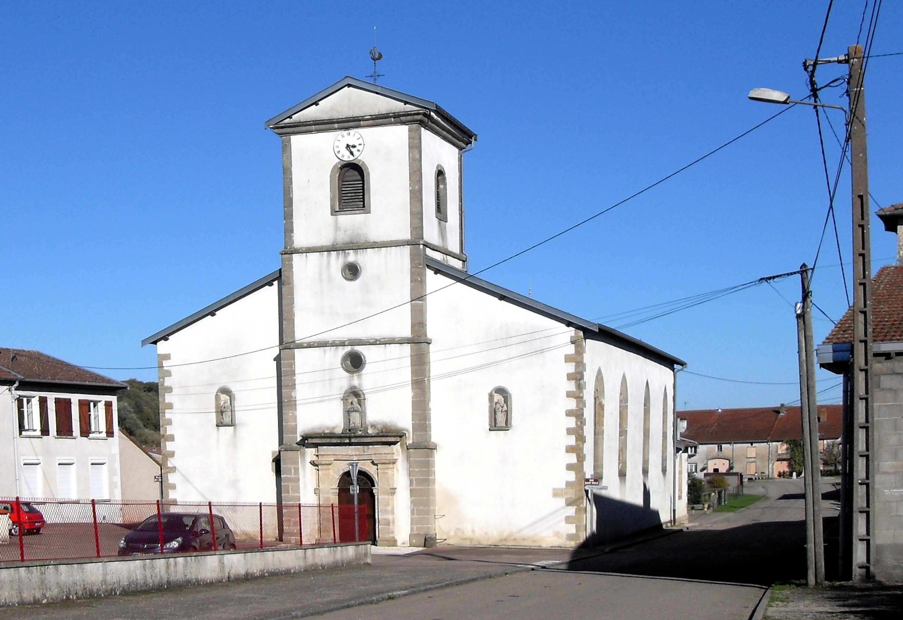 L'église Saint-Roch à Rozerotte